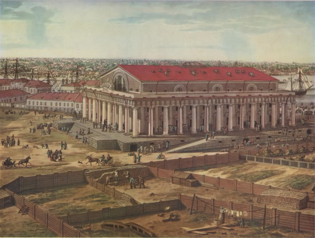 А. Тозелли. Панорама Петербурга. Акварель. 1820. Лист 8. Биржевая площадь и здание Биржи.